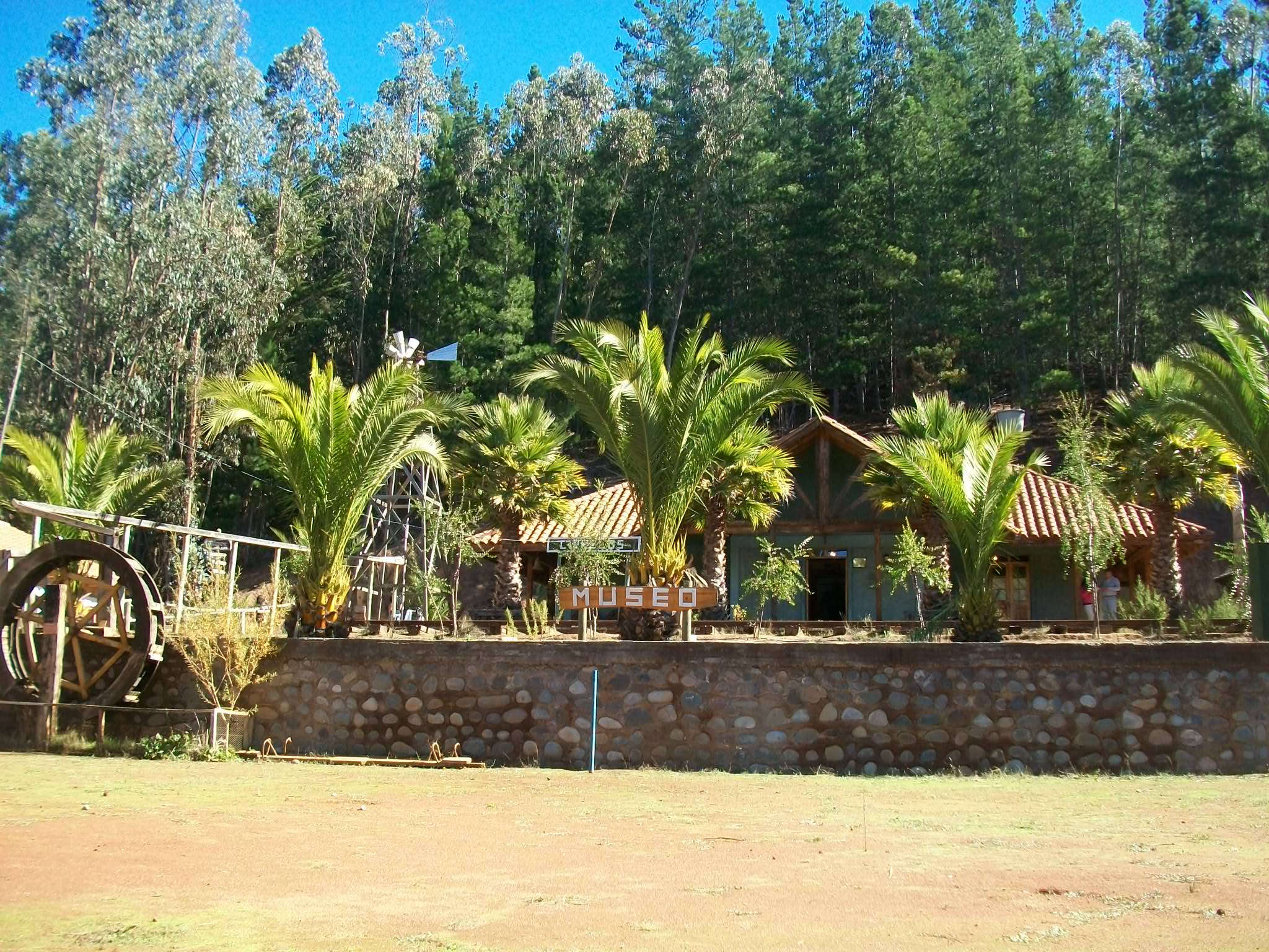 Museo del Niño Rural, en Ciruelos, cerca de Pichilemu